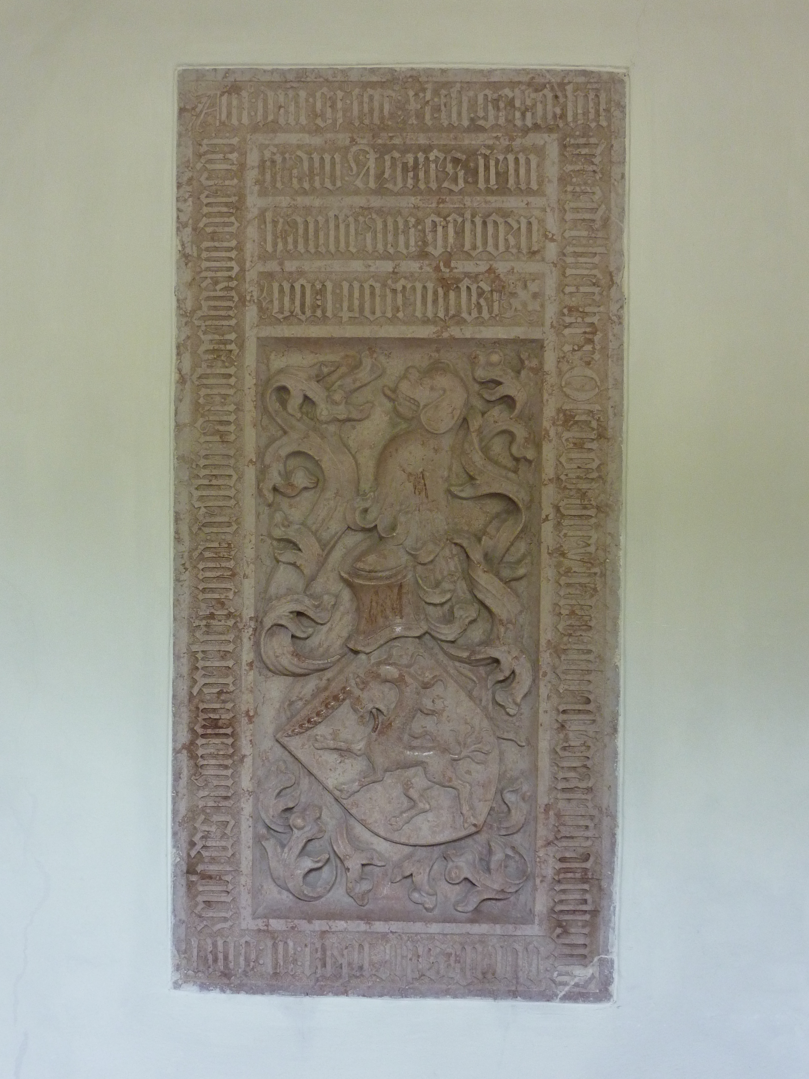 Kartause Aggsbach, Aggsbach-Dorf, Schönbühel-Aggsbach, Niederösterreich - Grabdenkmal für Otto IV. von Maissau und Gattin Agnes von Pottendorf (1440) im Kreuzgang